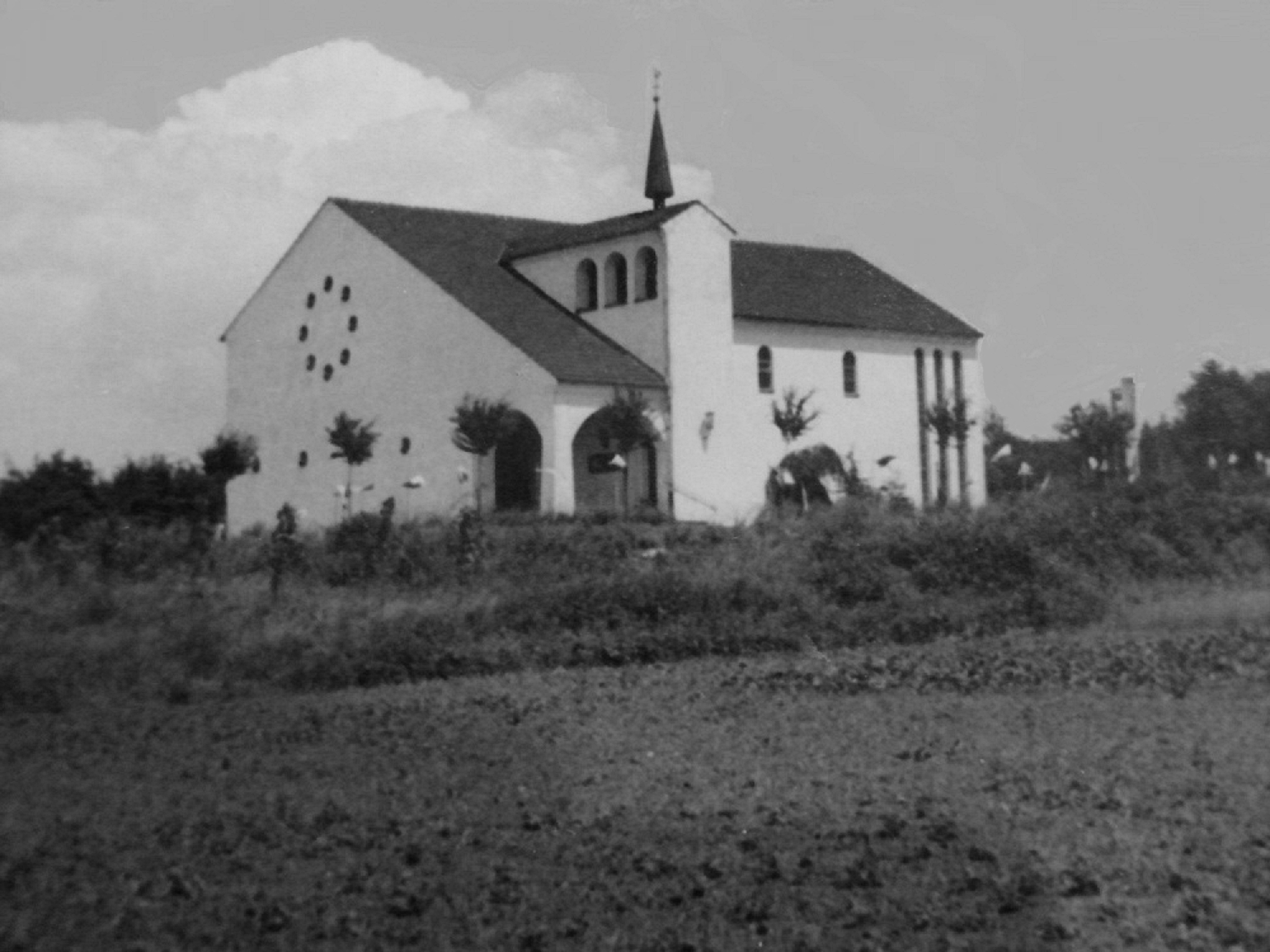 Christ-König Kirche in Holzlar, Bonn-Beuel